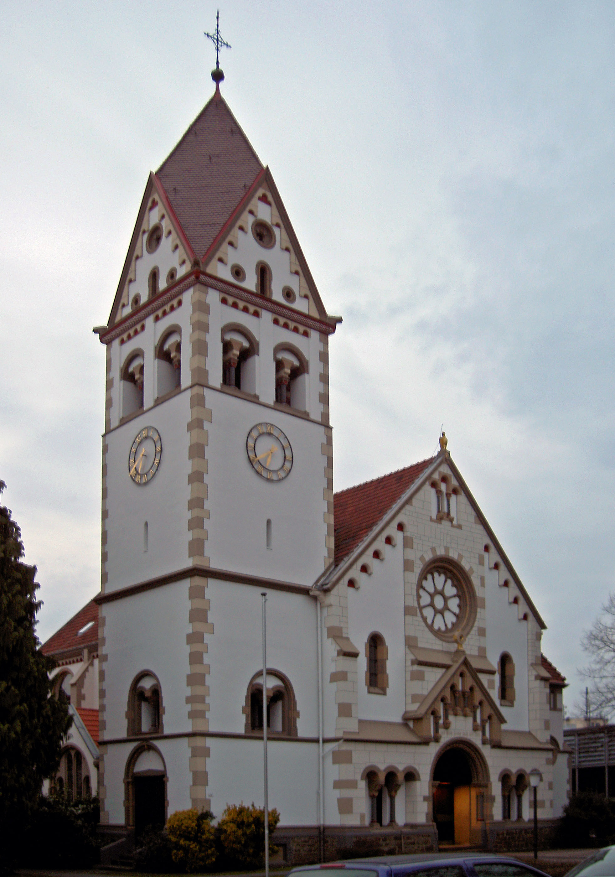 Evangelische Kirche nahe dem Alten Rathaus in Bad Honnef